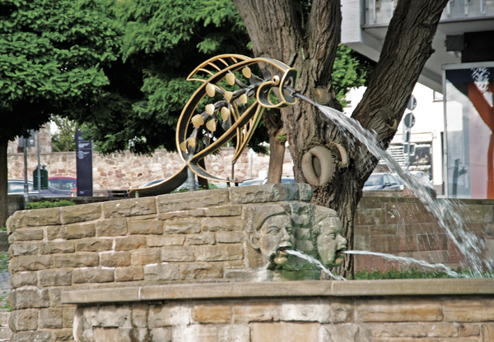 Zisselhering am Zisselbrunnen